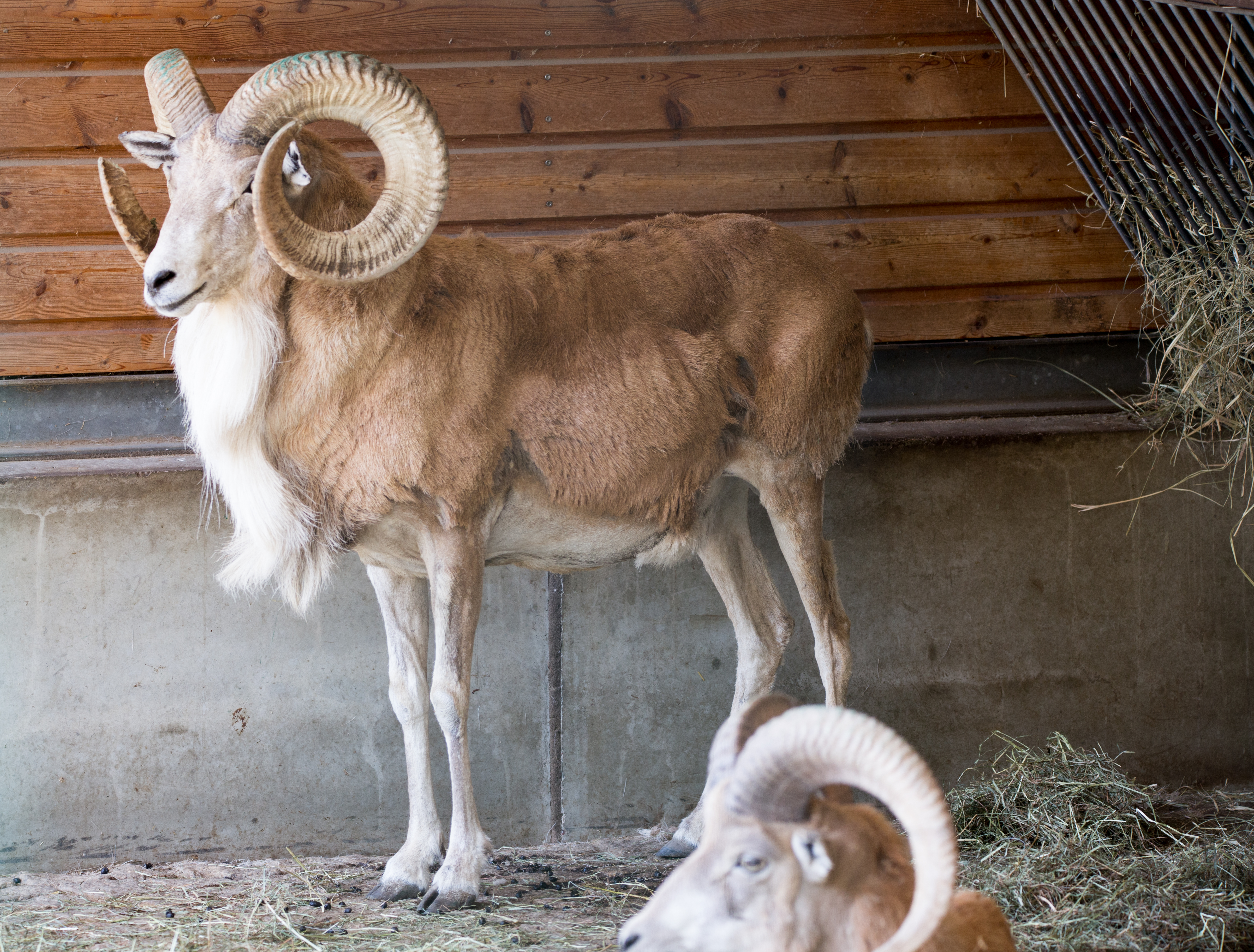 Kreishornschafek auch Urial oder Steppenschafe genannt (Ovis vignei) im Tierpark Berlin.